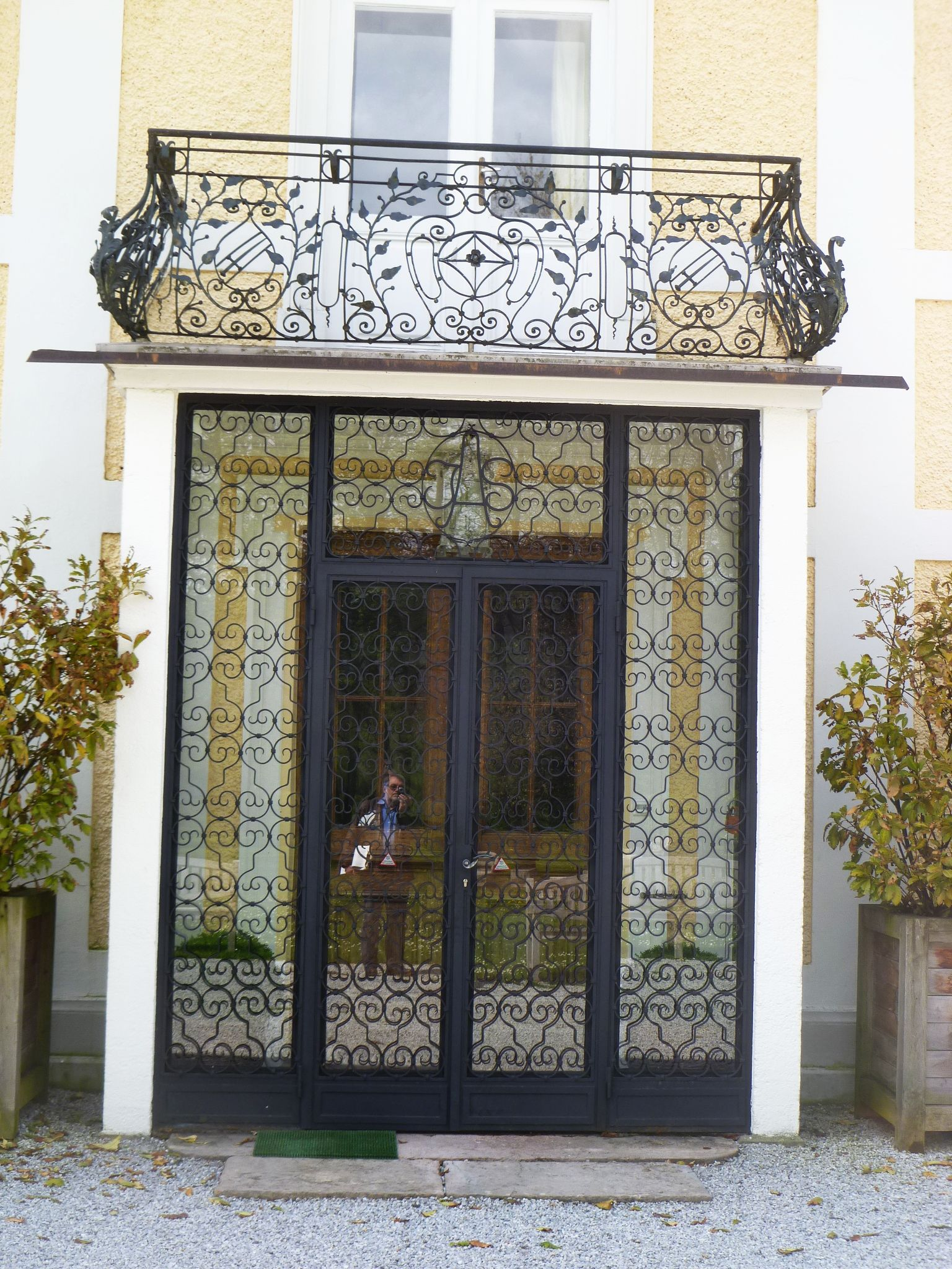 Hotel Restaurant Maria Theresien-Schlössl